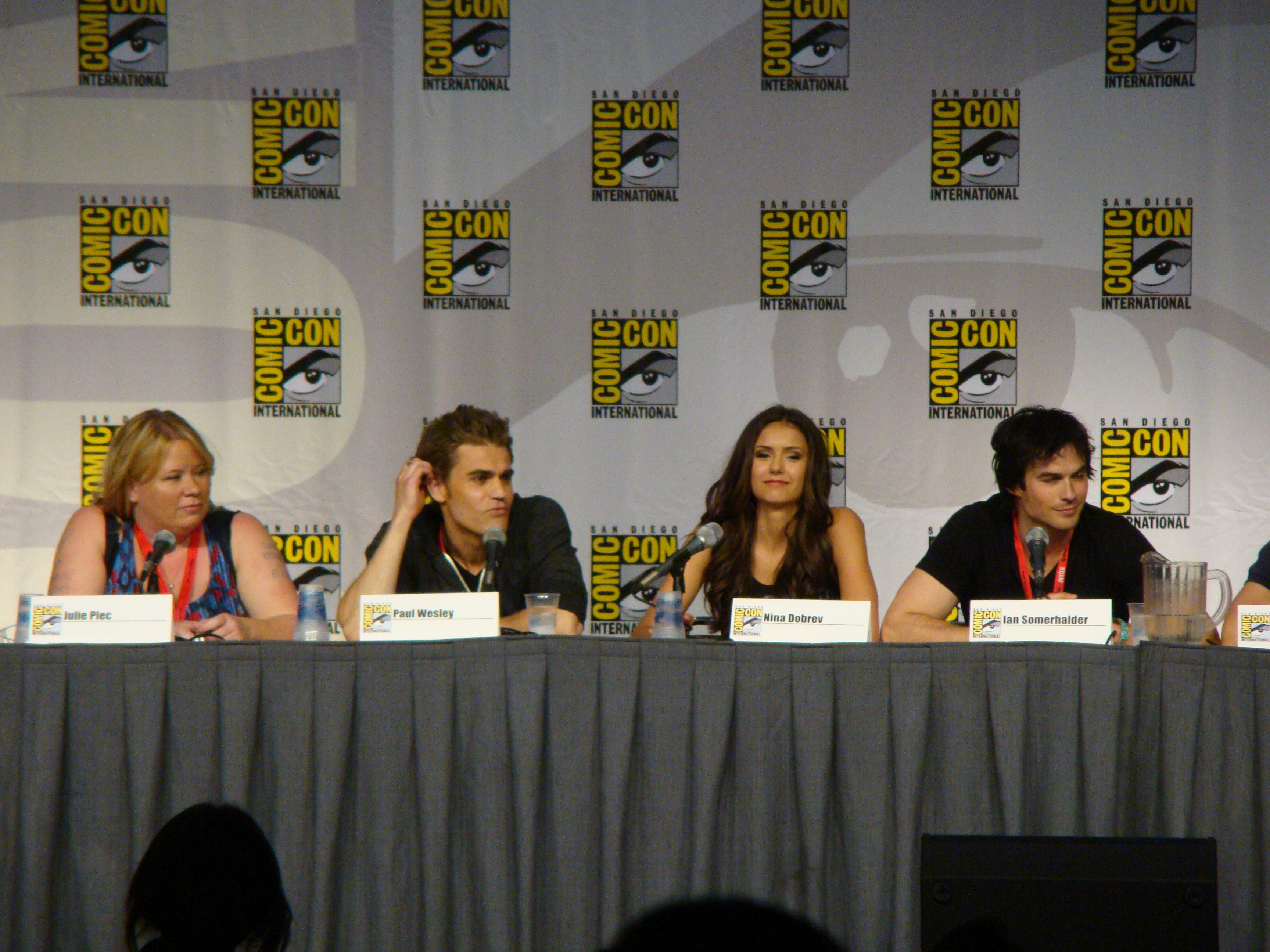 Julie Plec, Paul Wesley, Nina Dobrev & Ian Somerhalder